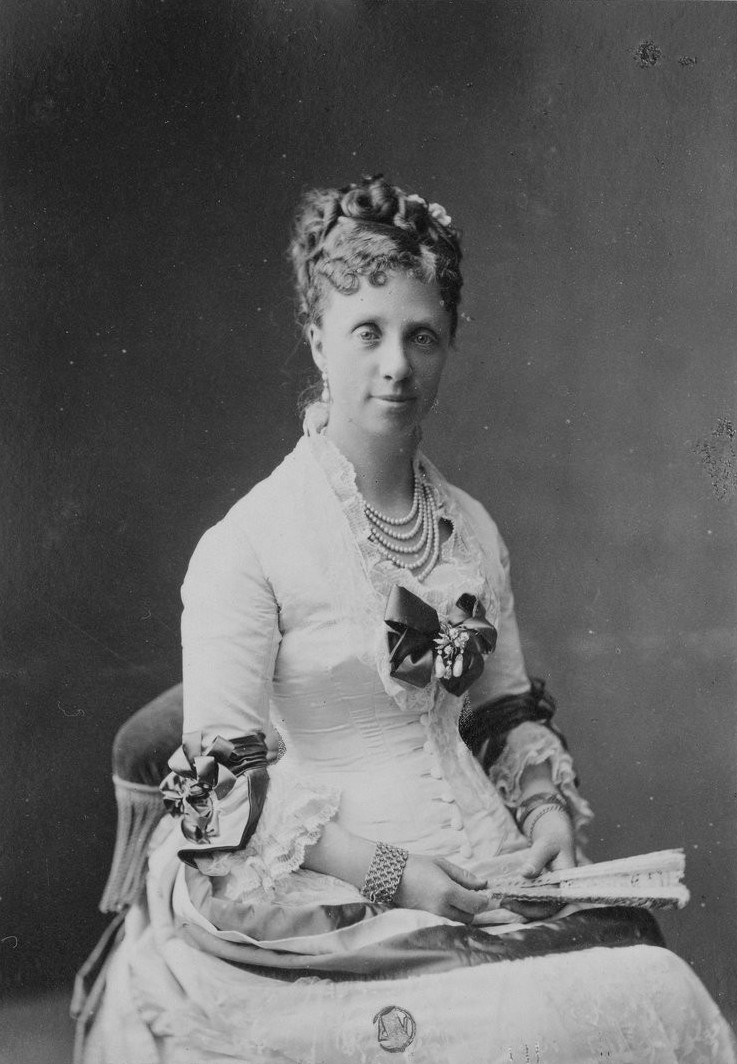 Duchesse Marguerita de Madrid (1847-1893).